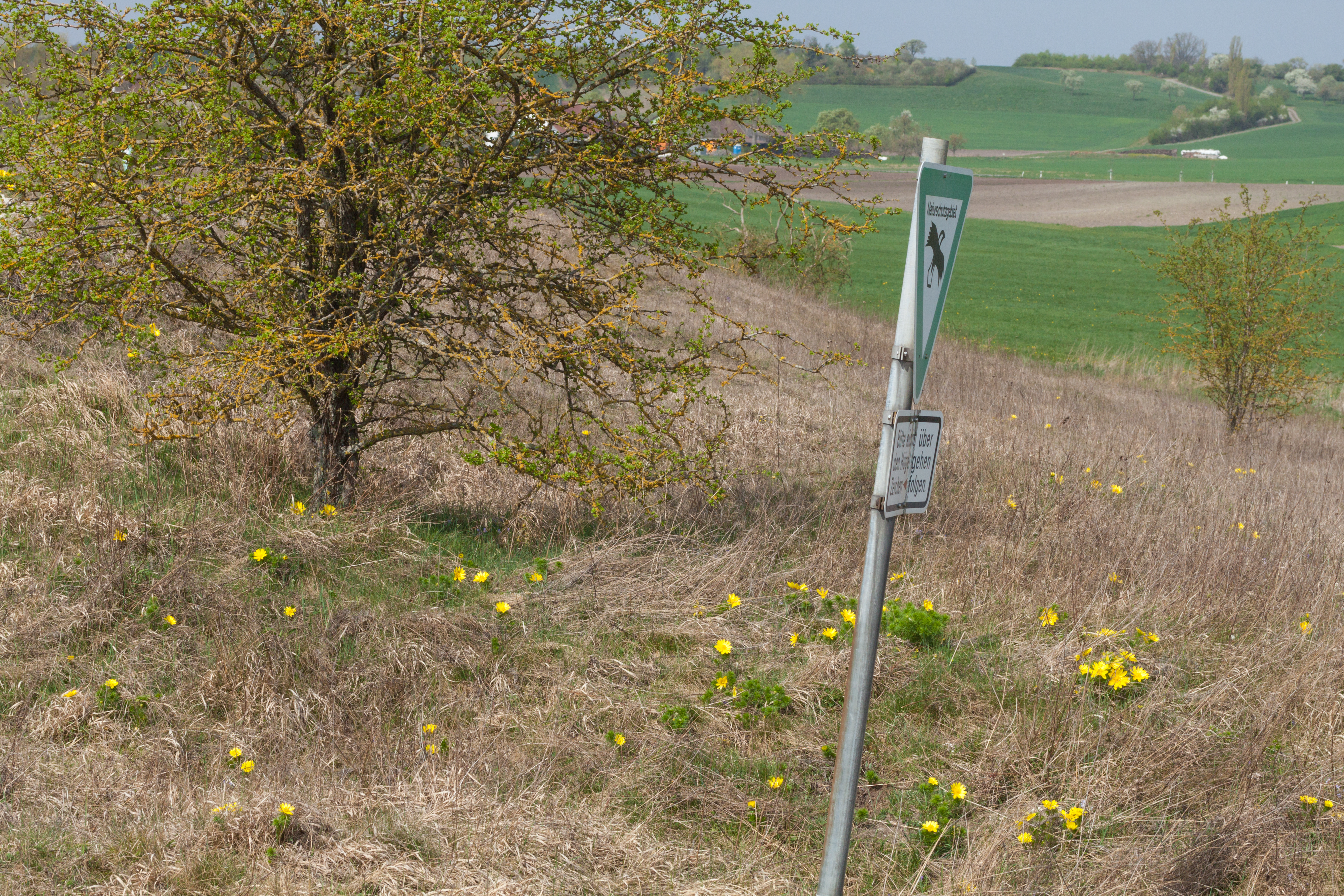 Frühlings-Adonisröschen (Adonis vernalis) im NSG Külsheimer Gipshügel bei Bad Windsheim, West-Mittelfranken, Bayern, Bundesrepublik Deutschland.